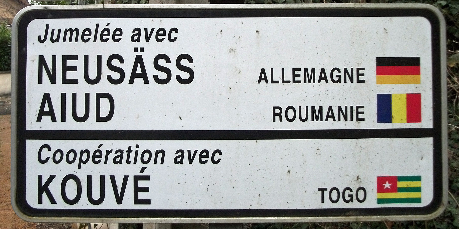 Panneau indiquant les villes jumelées avec Cusset. Cet exemplaire a été pris sur la D 995 en provenance de Ferrières-sur-Sichon